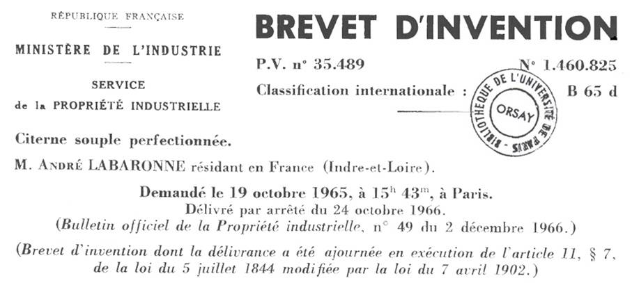 Brevet d'invention de la Citerne Souple de Monsieur André LABARONNE (1966).